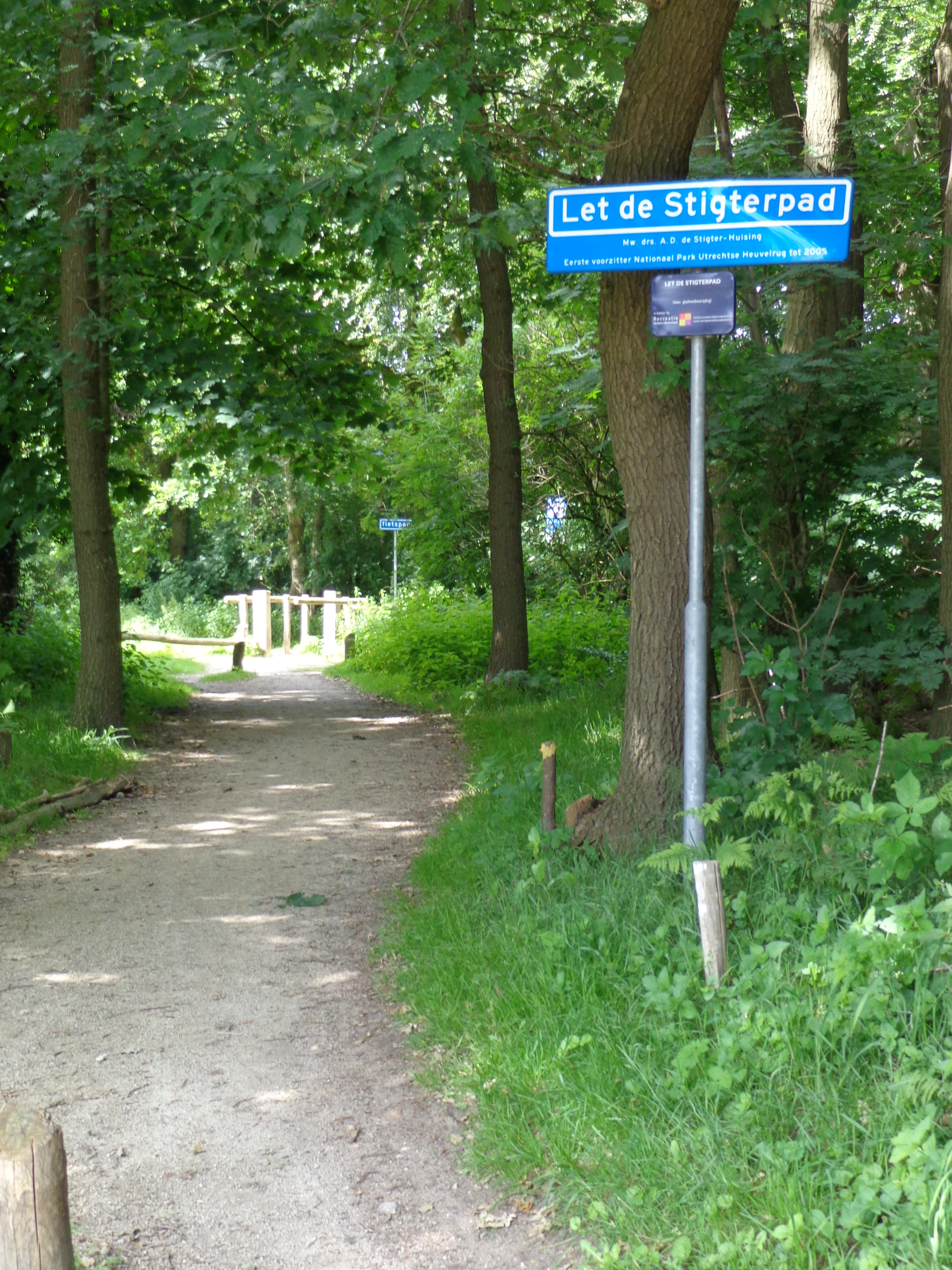 Let de Sligterpad, fietspad genoemd naar Mw. drs. A.D. de Stigter-Huising, eerste voorzitter van Nationaal Park Utrechtse Heuvelrug tot 2005 This is a photo or sound file made in Utrechtse Heuvelrug National Park in the Netherlands, with the main subject of the file in the category: landscapes